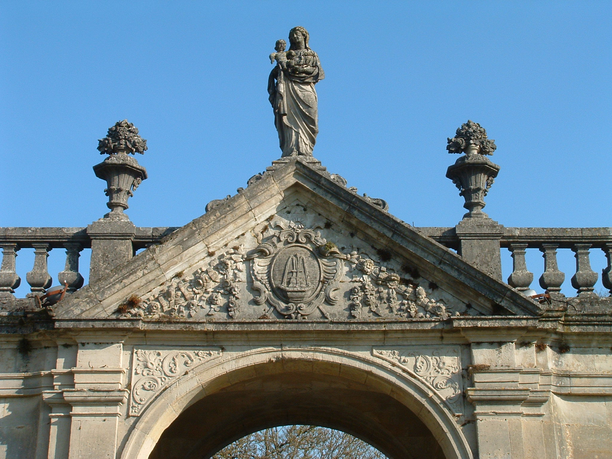 Abbaye de Trois-Fontaines - Entrée